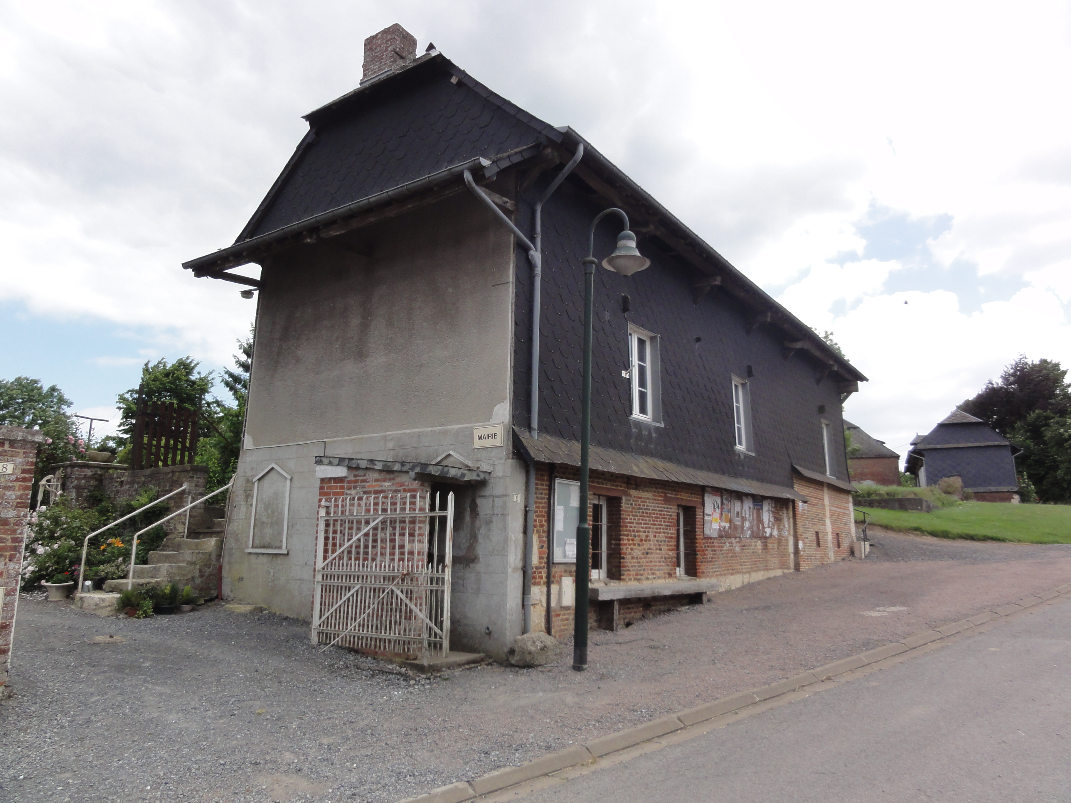 Saint-Clément (Aisne) mairie